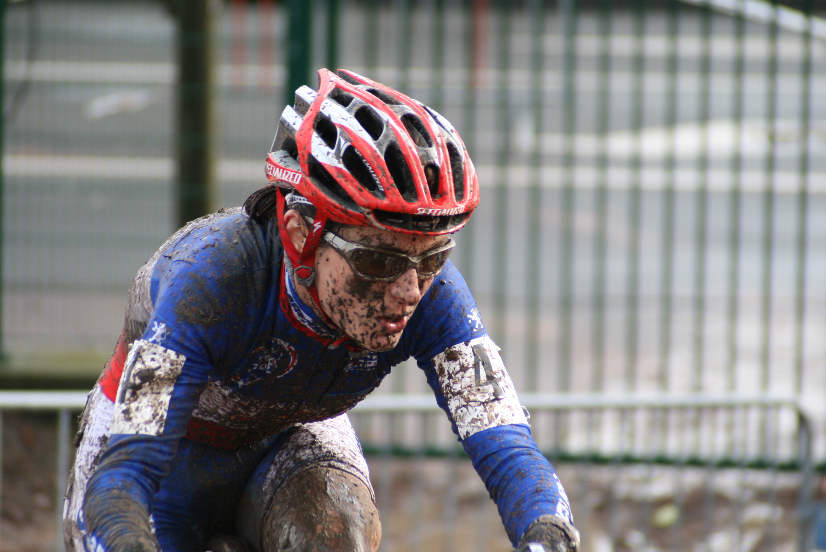 Maryline Salvetat, au Grand Prix Lille Métropole 2009